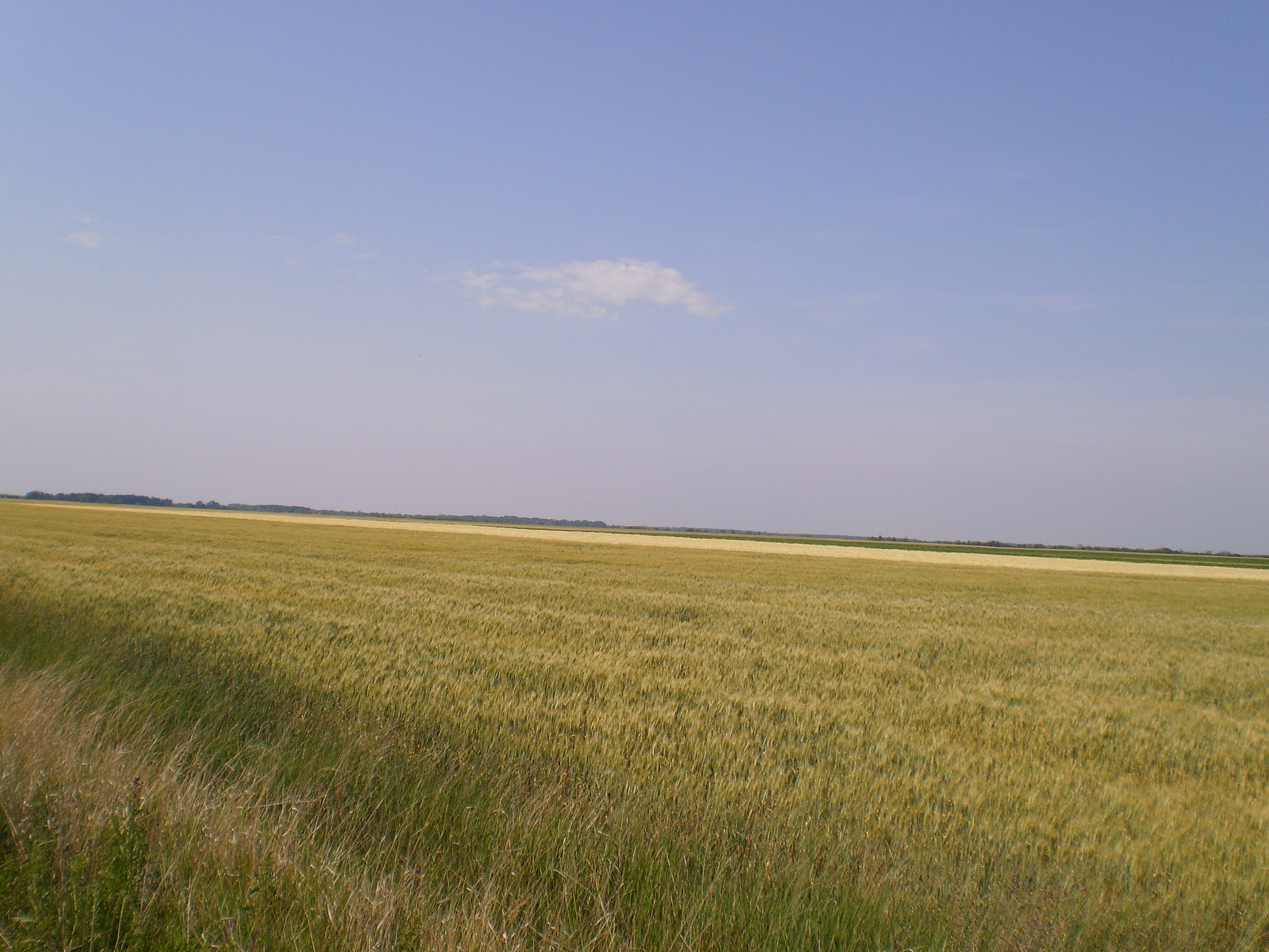 Egy puszta a Tiszántúlon.